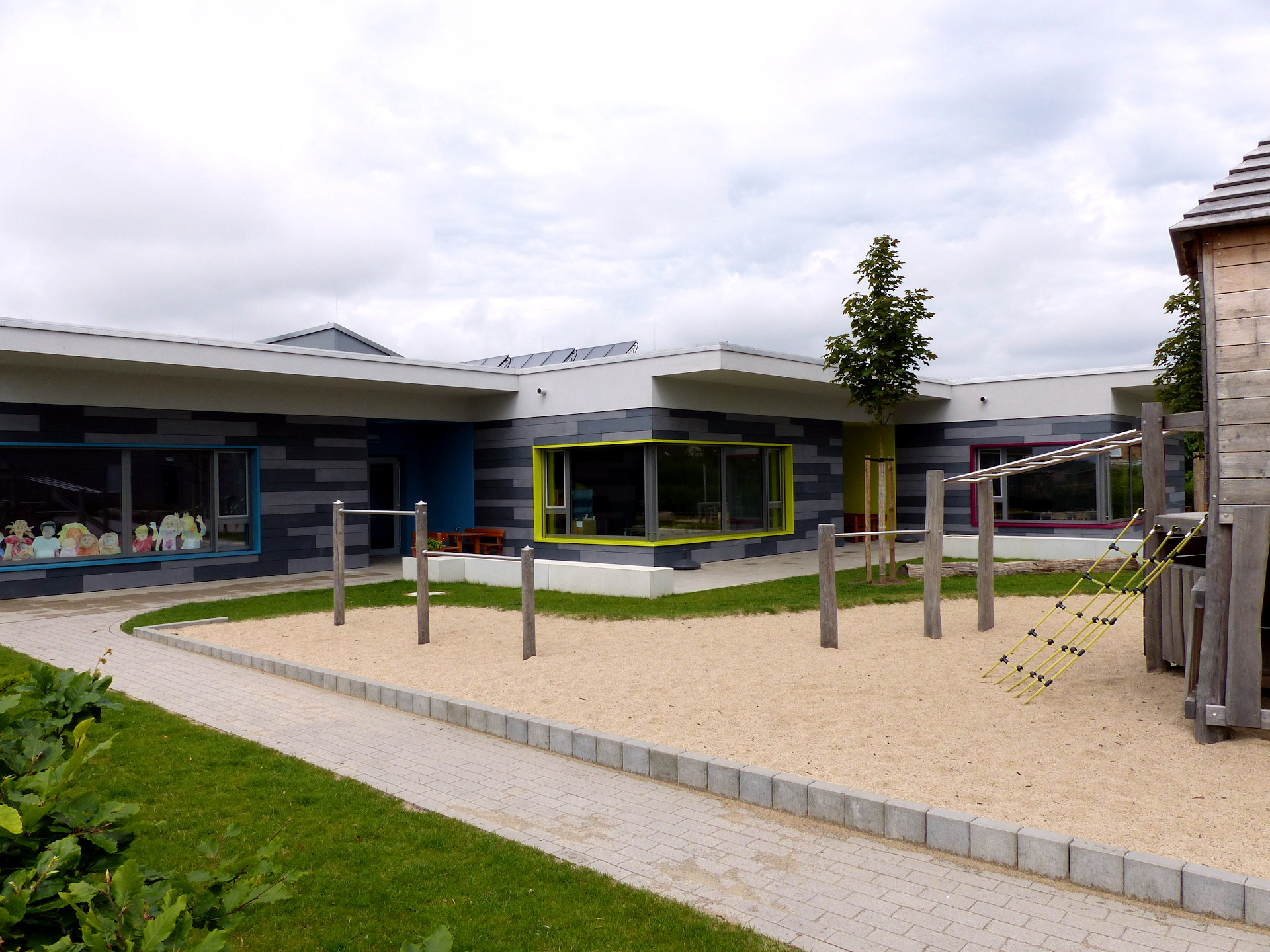 Blick auf die Freifläche und die Gruppenräume der Kindertagesstätte Leiferde